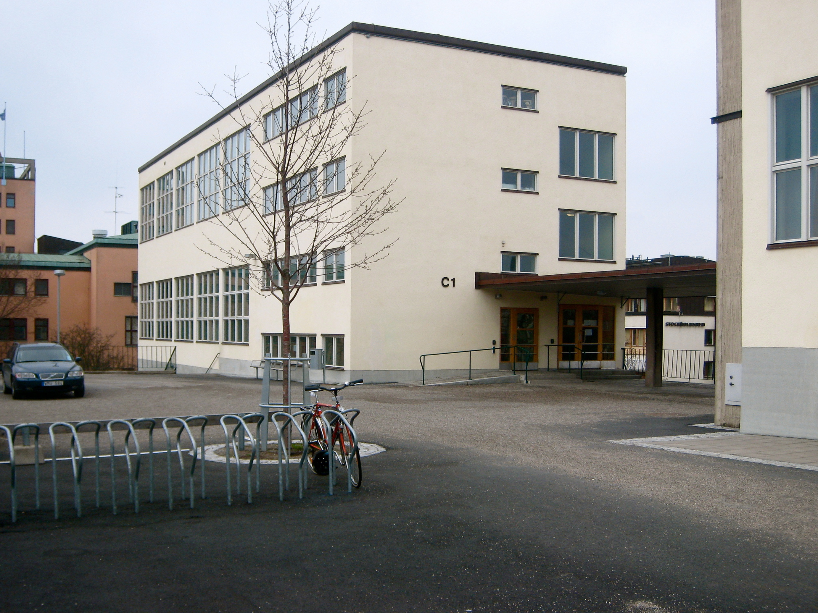 Zinkendammsskolan (today Globala gymnasiet). Architect Paul Hedqvist 1936.